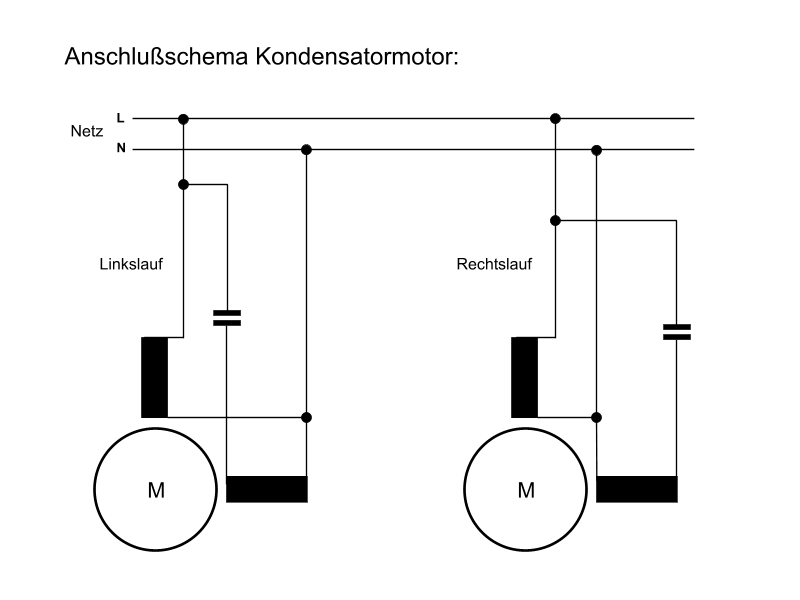 Anschlußschema Kondensatormotor an Wechselspannung